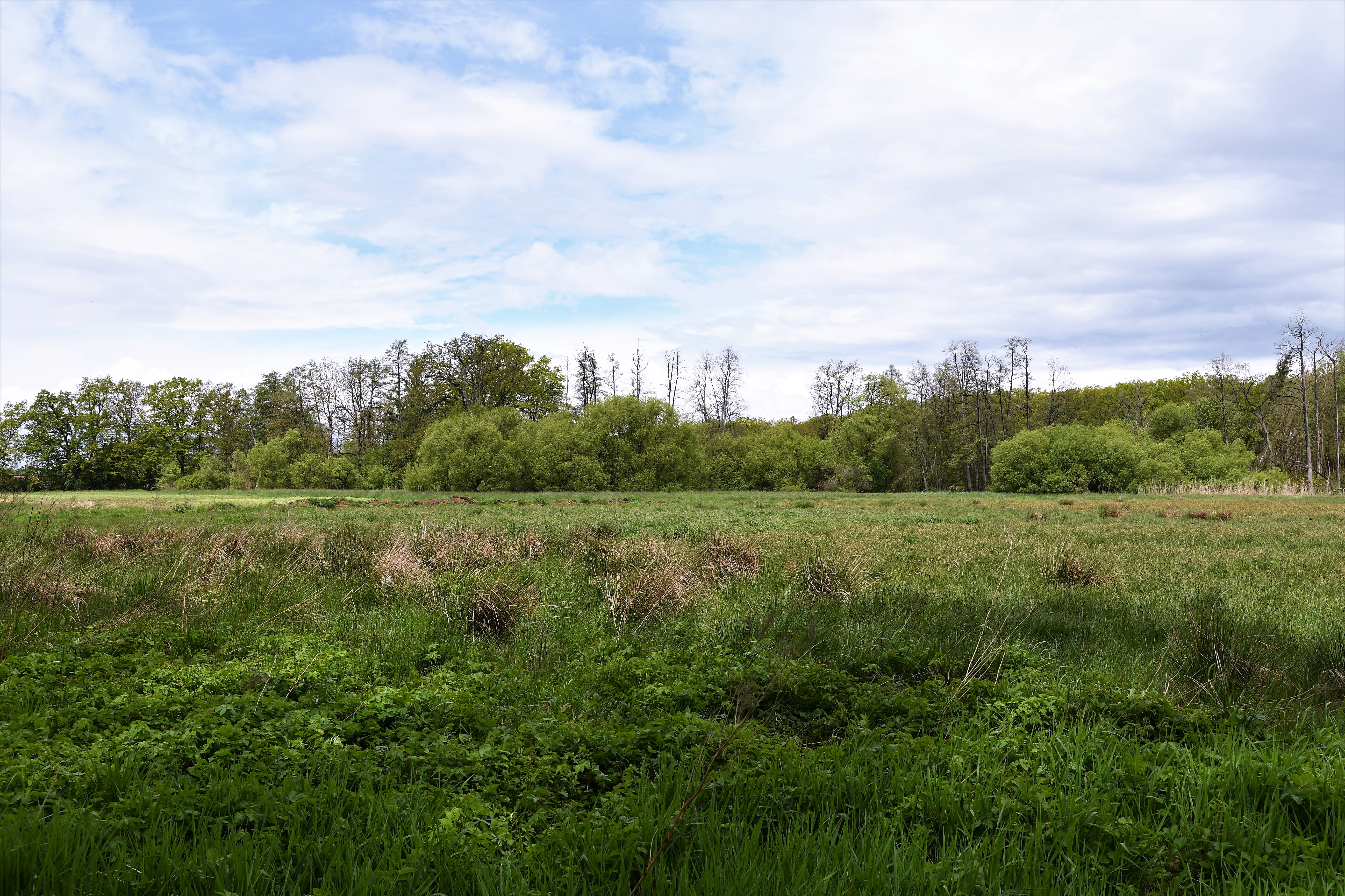 Sooswiesen in den Gründlachauen im Nordosten von Neunhof